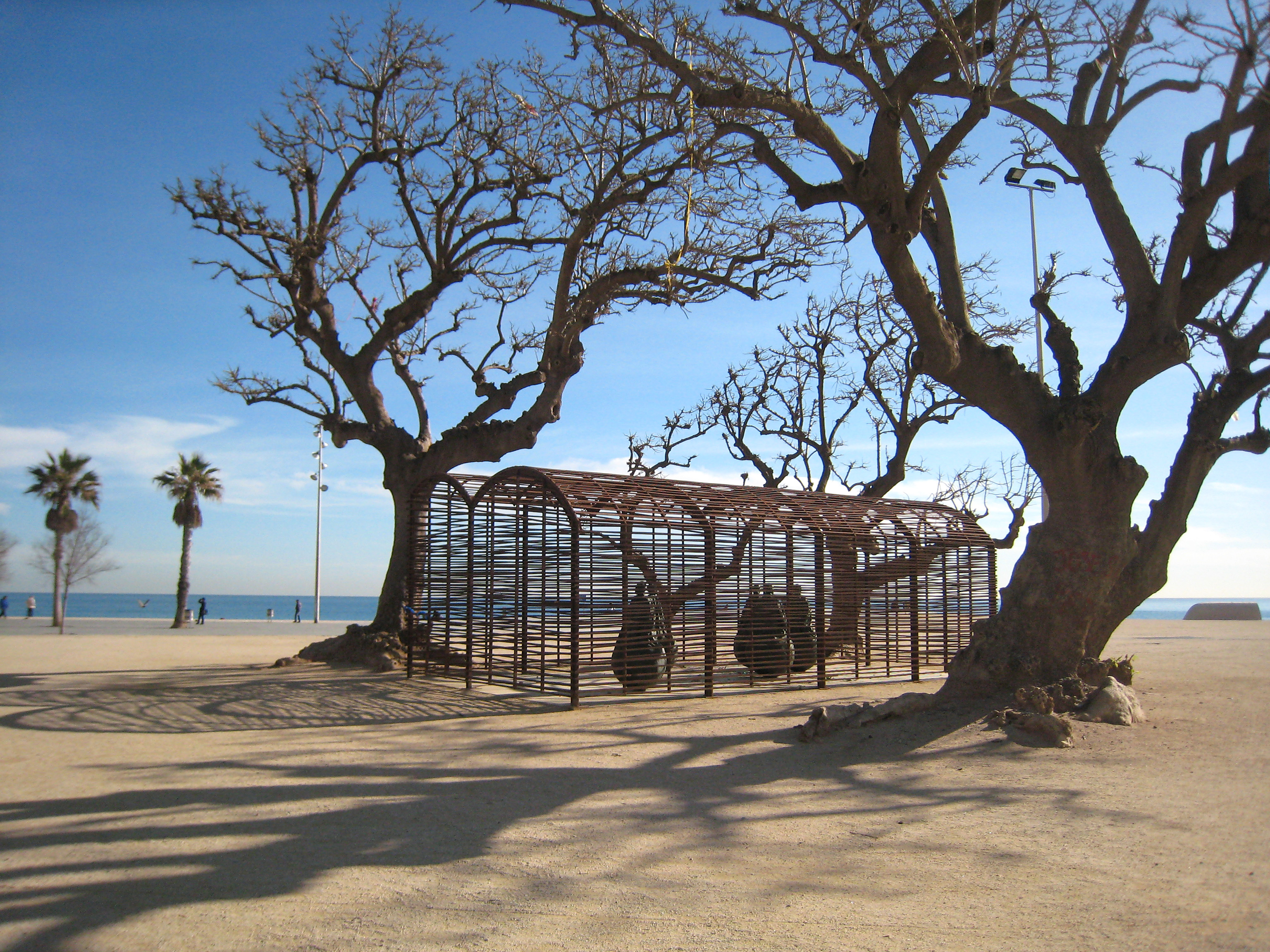 Configuracions Urbanes: Una habitació on sempre plou (Juan Muñoz). Pl. del Mar (Barcelona)